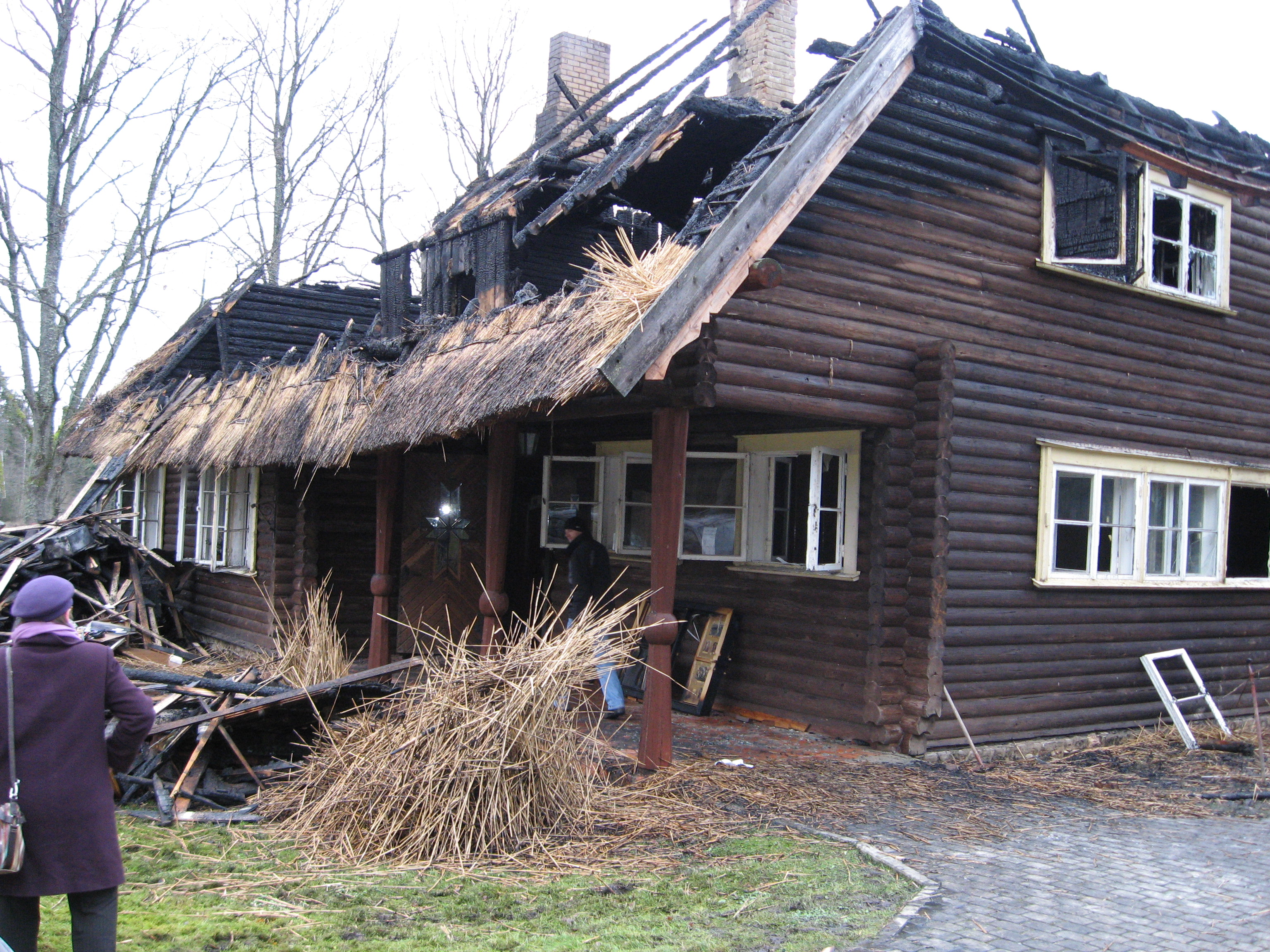 Ugunsgrēks "Airītēs" notika 2007.gada 23.novembrī.